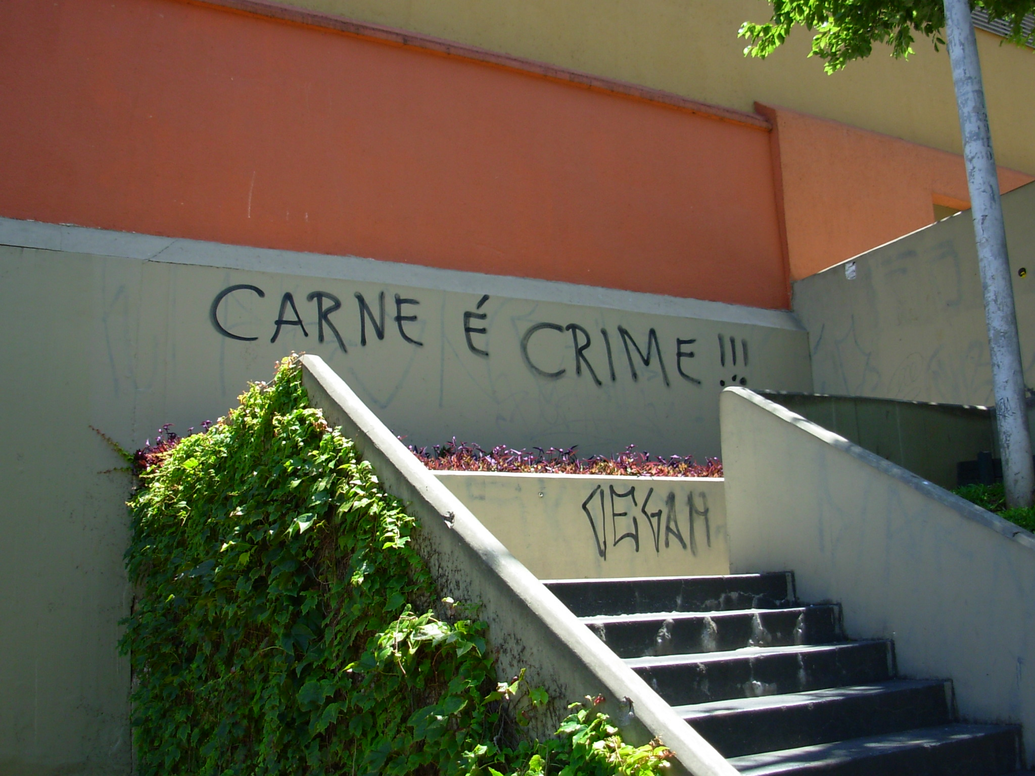 Ímpetos vegano-criminosos